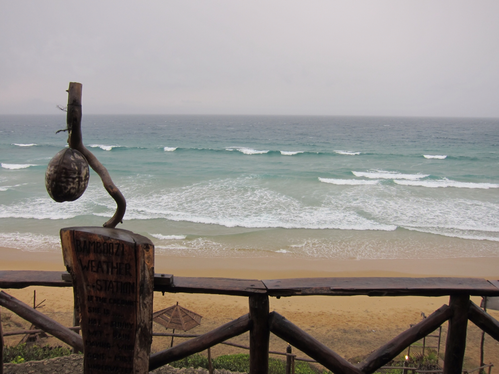 Harde woei vandaag..